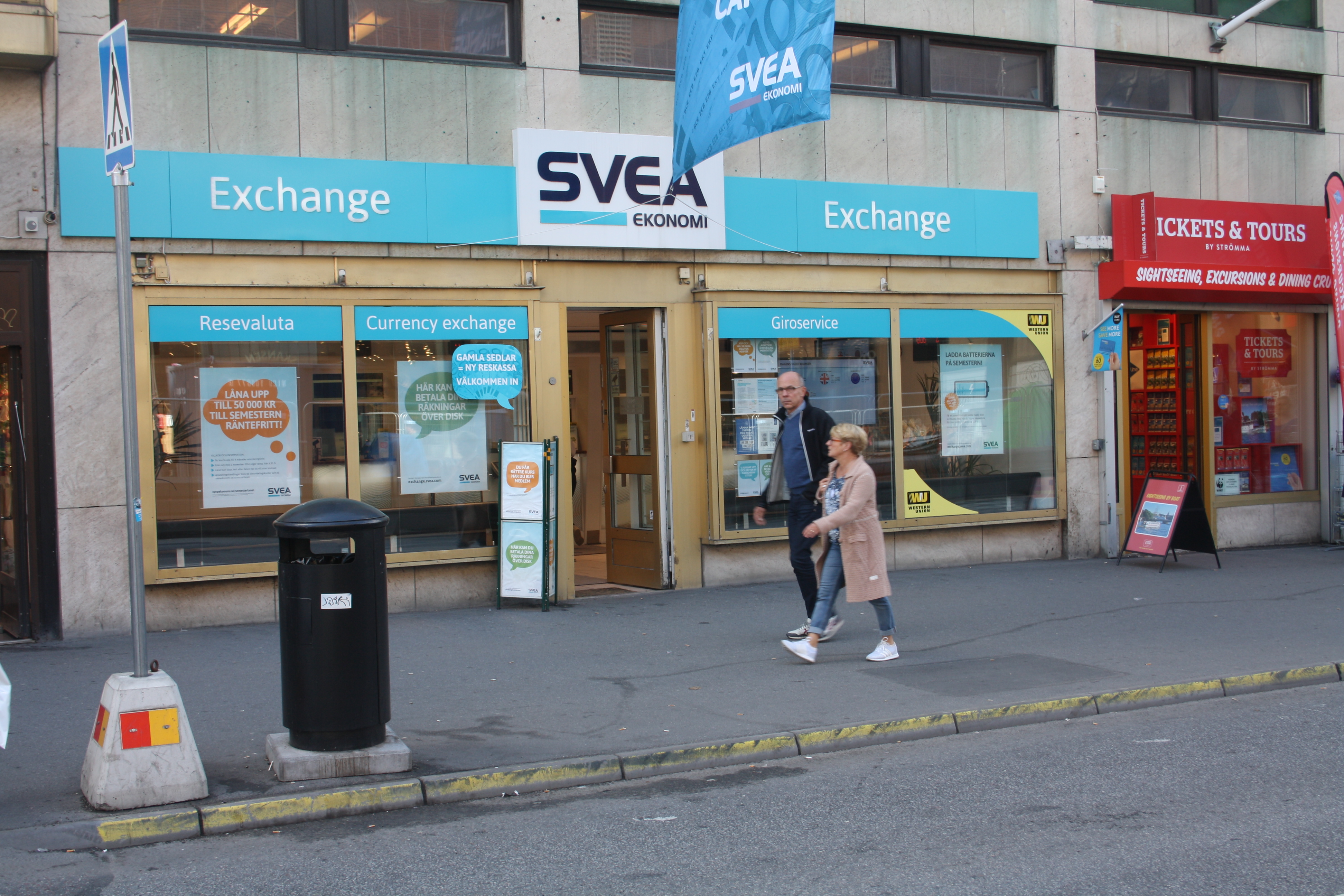 Svea Ekonomi